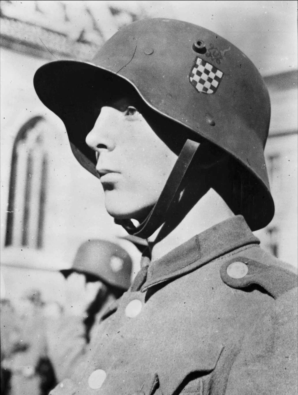 Propagandabild aus Kroatien, Kroatischer Wachposten